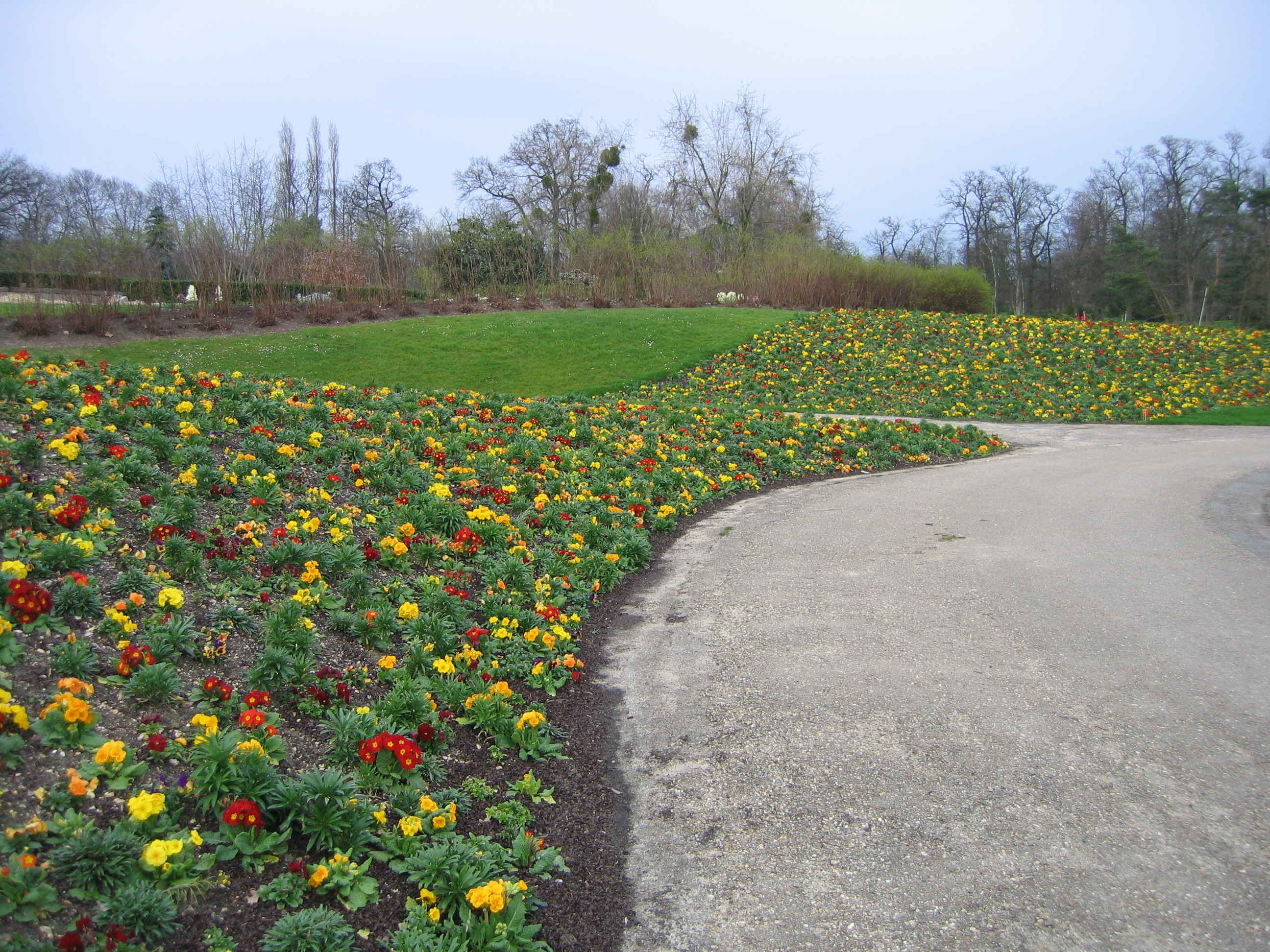 Parc floral de Paris mars 2007